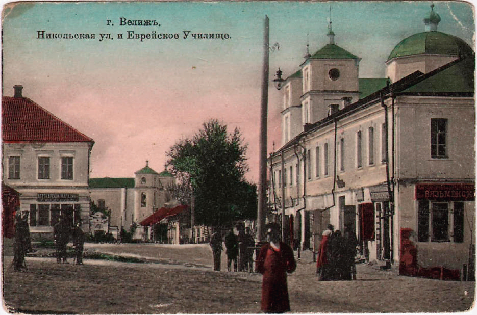 Беларуская (тарашкевіца): Вяліж (Vialiž), пляц Рынак (plac Rynak) у бок вуліцы Мікольскай (vulica Mikolskaja). Колішні касьцёл